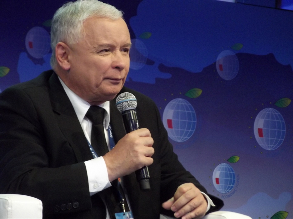 Zdjęcie zrobione podczas XXIII Forum Ekonomicznego w Krynicy-Zdroju.